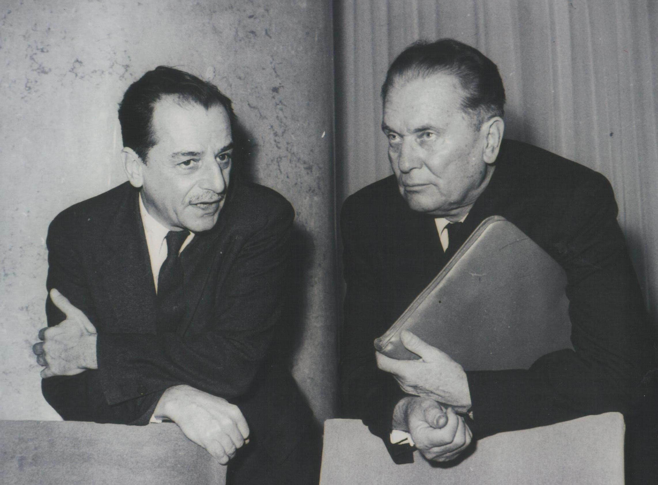 Koča Popović i Josip Broz Tito.foto: Stevan Kragujević (po odobrenju kćerke Tanje Kragujević)